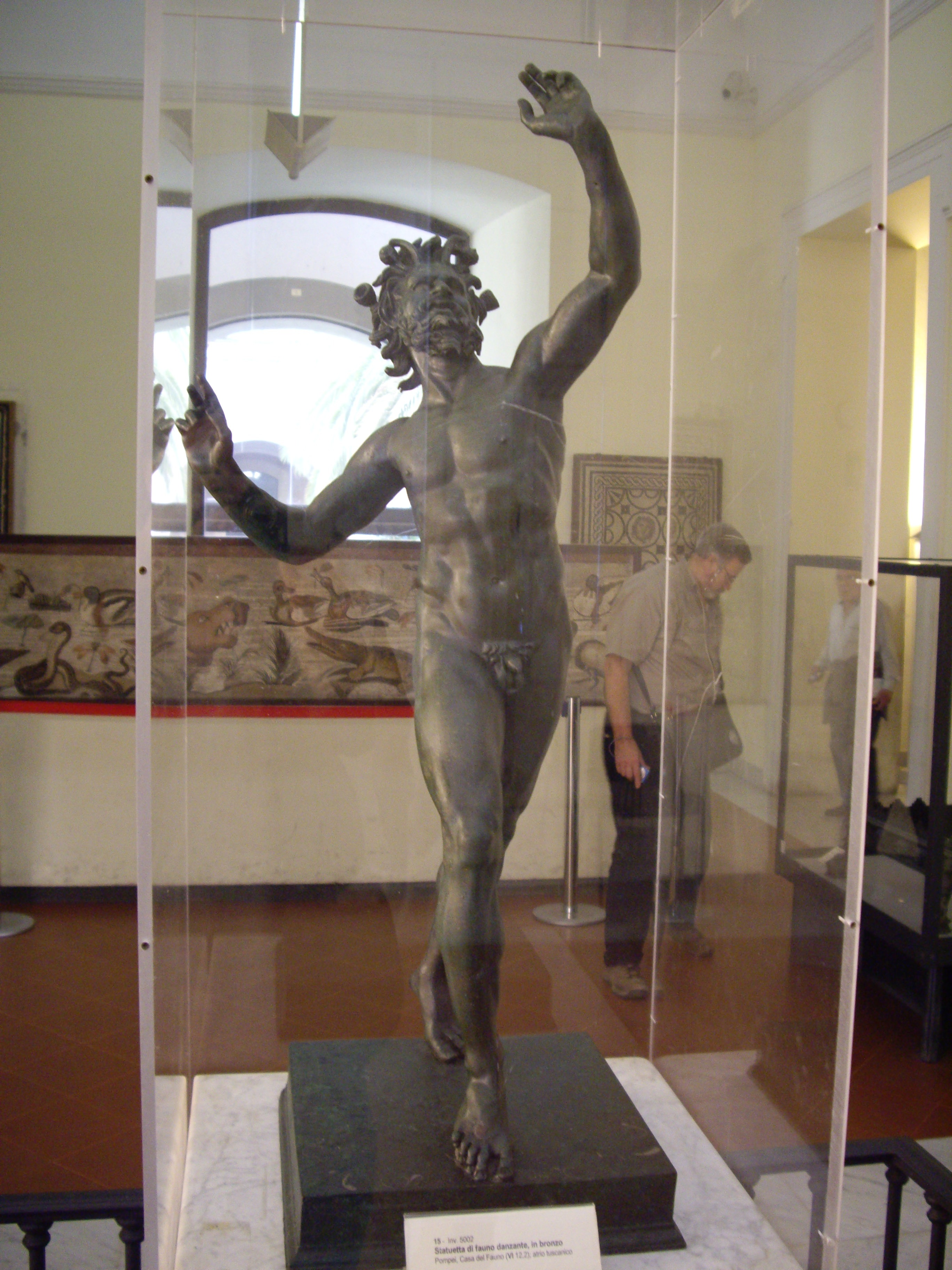 Bronze statue of the Faun in Pompeii - Museo archeologico nazionale di Napoli.